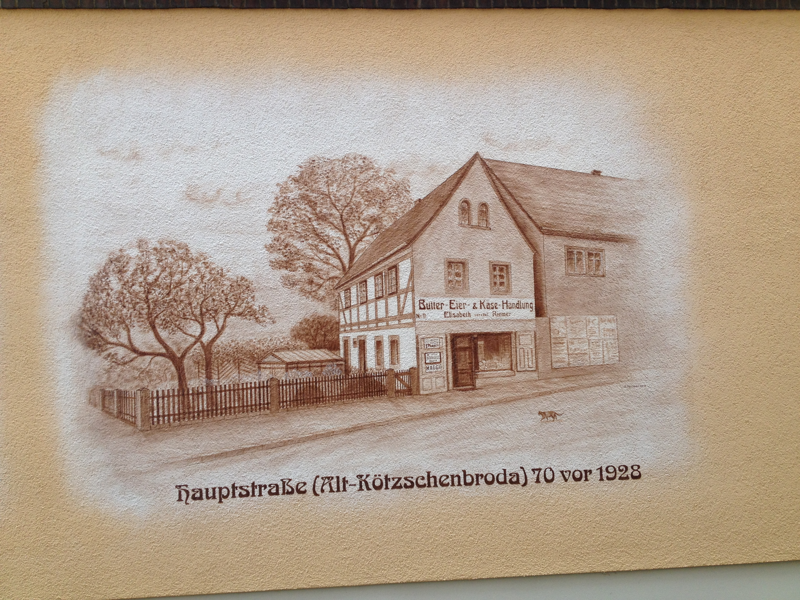 Wohn- und Geschäftshaus Bahnhofstraße 12 (Radebeul), Wandgemälde dauerhaft vom öffentlichen Grund zu sehen. Gemälde entzerrt und Winkel korrigiert